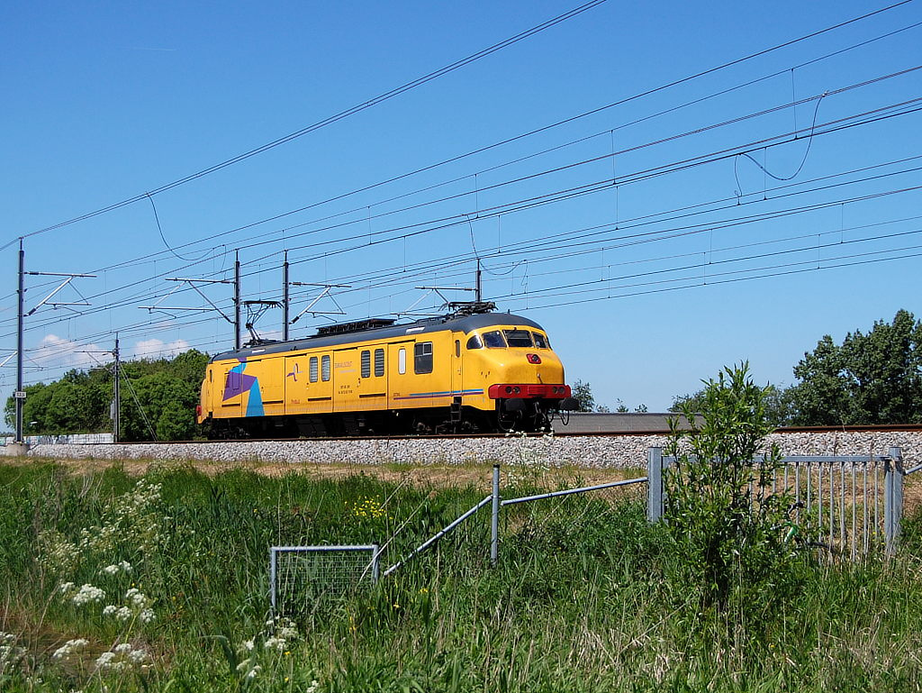 Ex mP 3024,nu beter bekend als Jim,of BRT 08. Fantastisch materieel,deze voormalige motorposten.Gelukkig bezit ik de HAMO 3004,met twee Hbbkkss*en.Mooie herinnering ;-)